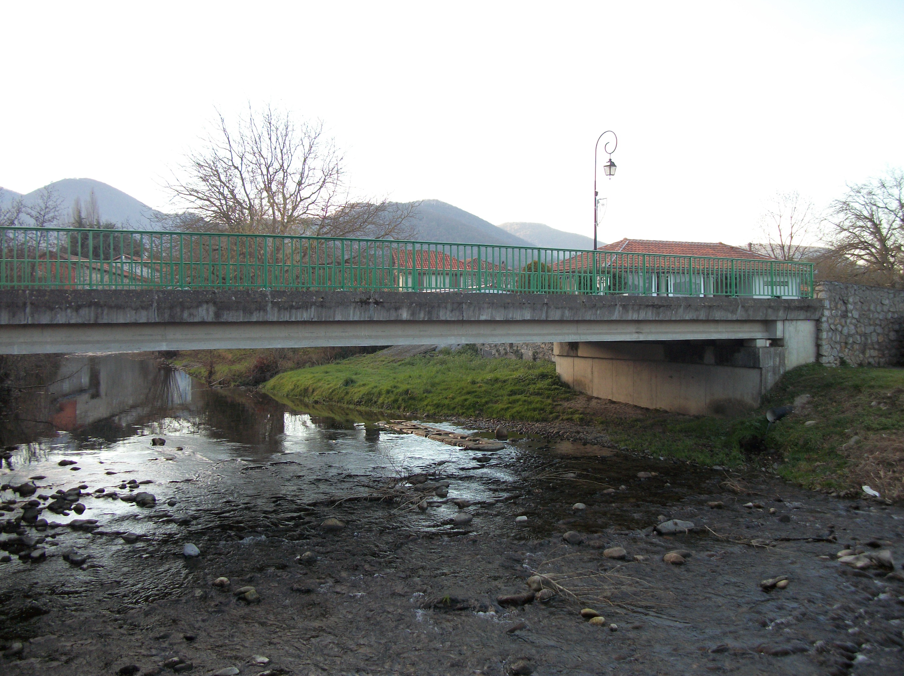 Pont sur la rivière Ourse